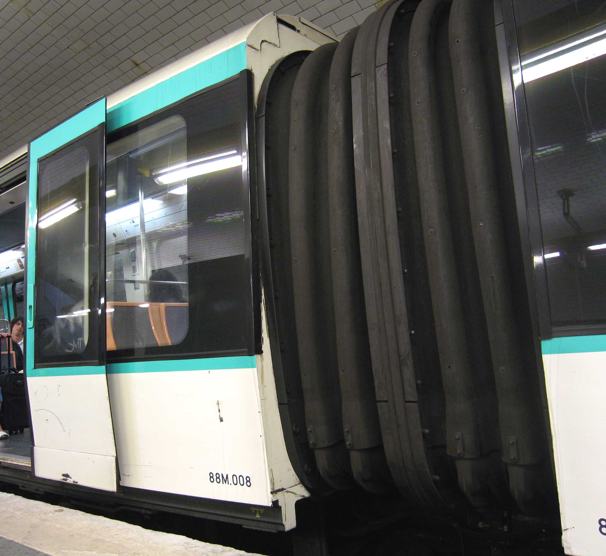 Anneau d'intercirculation de rame MF88, Paris, France